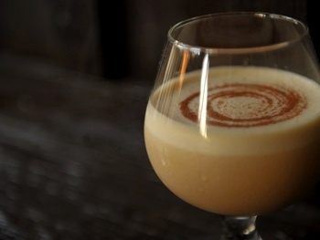 Trago chiclayano preparado a base de Pisco, algarrobina, leche y huevos.